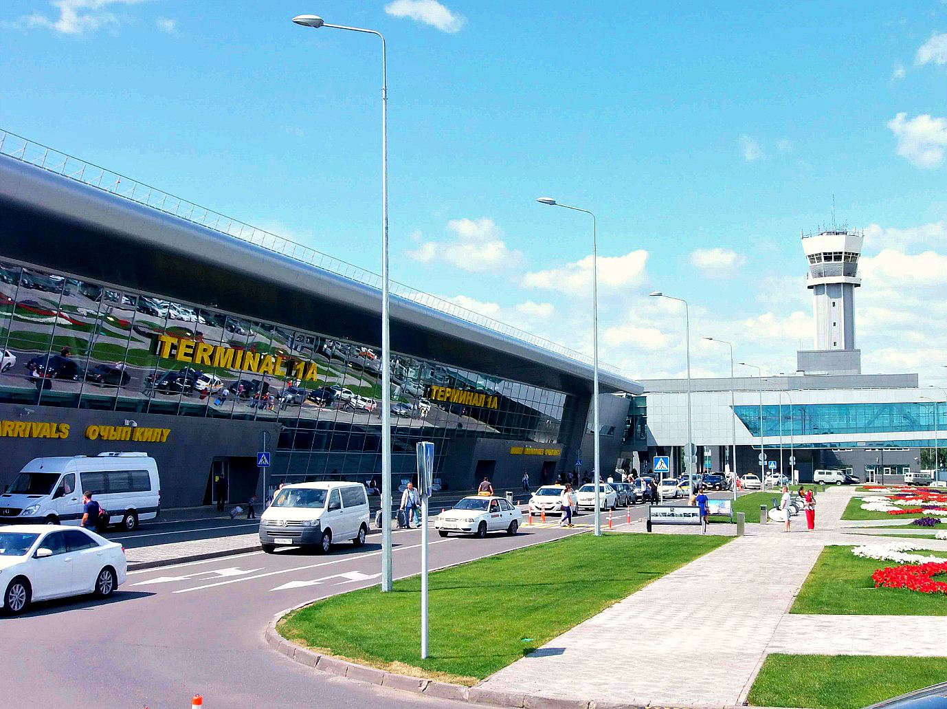 Терминал 1А международного аэропорта Казань